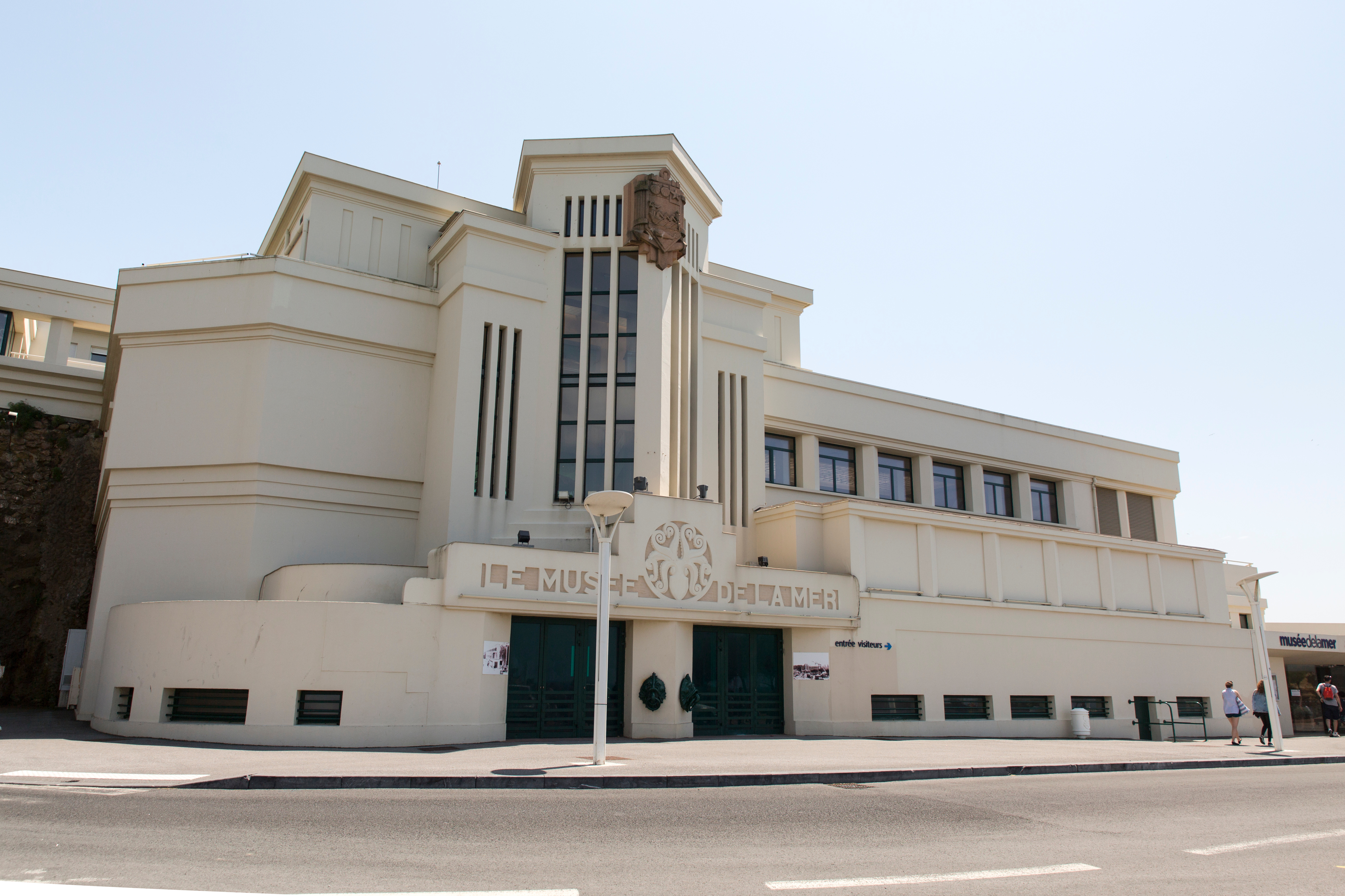 Musée de la mer